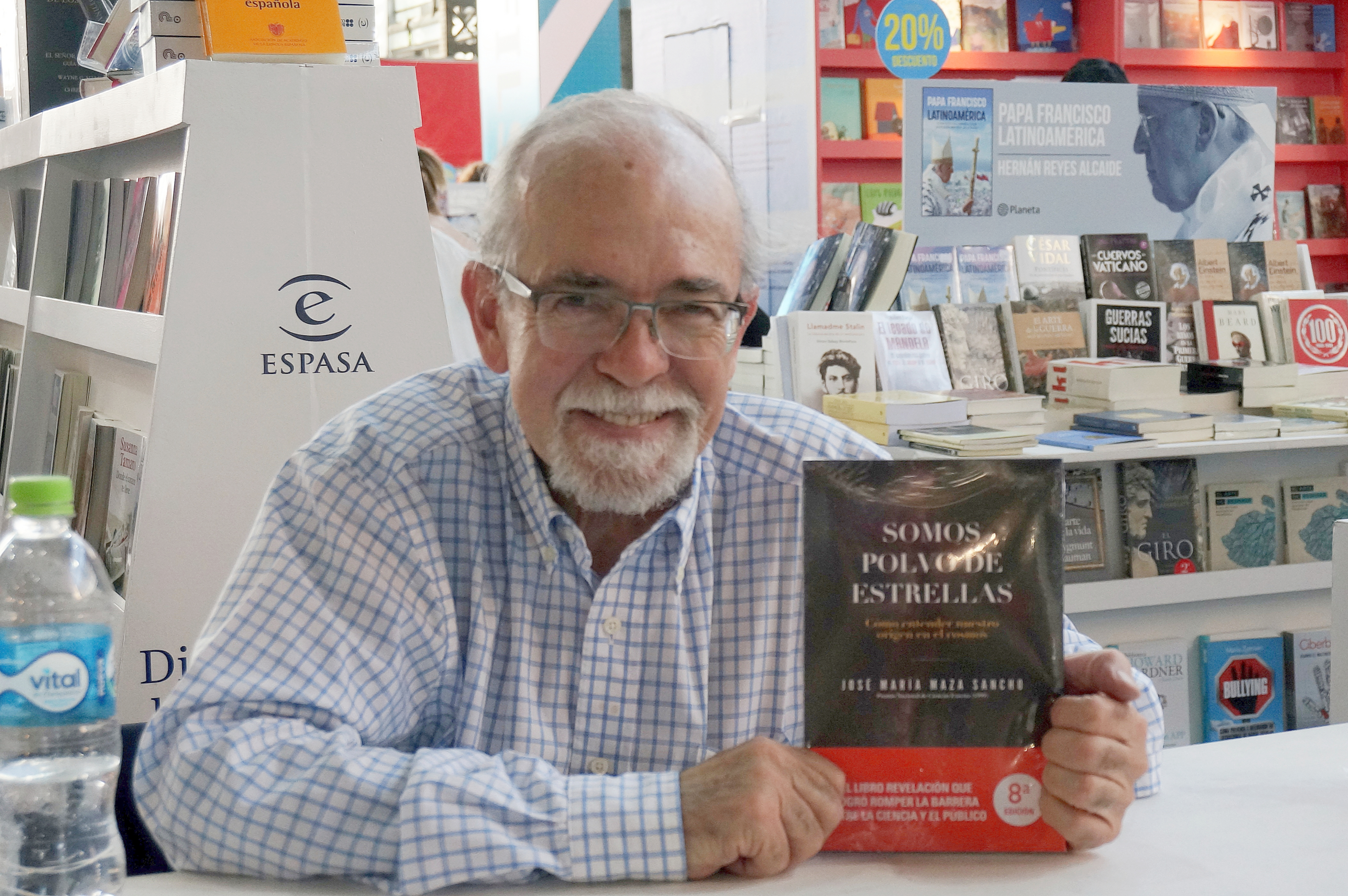 El astrofísico chileno José Maza en la Feria Internacional del Libro de Santiago 2017.